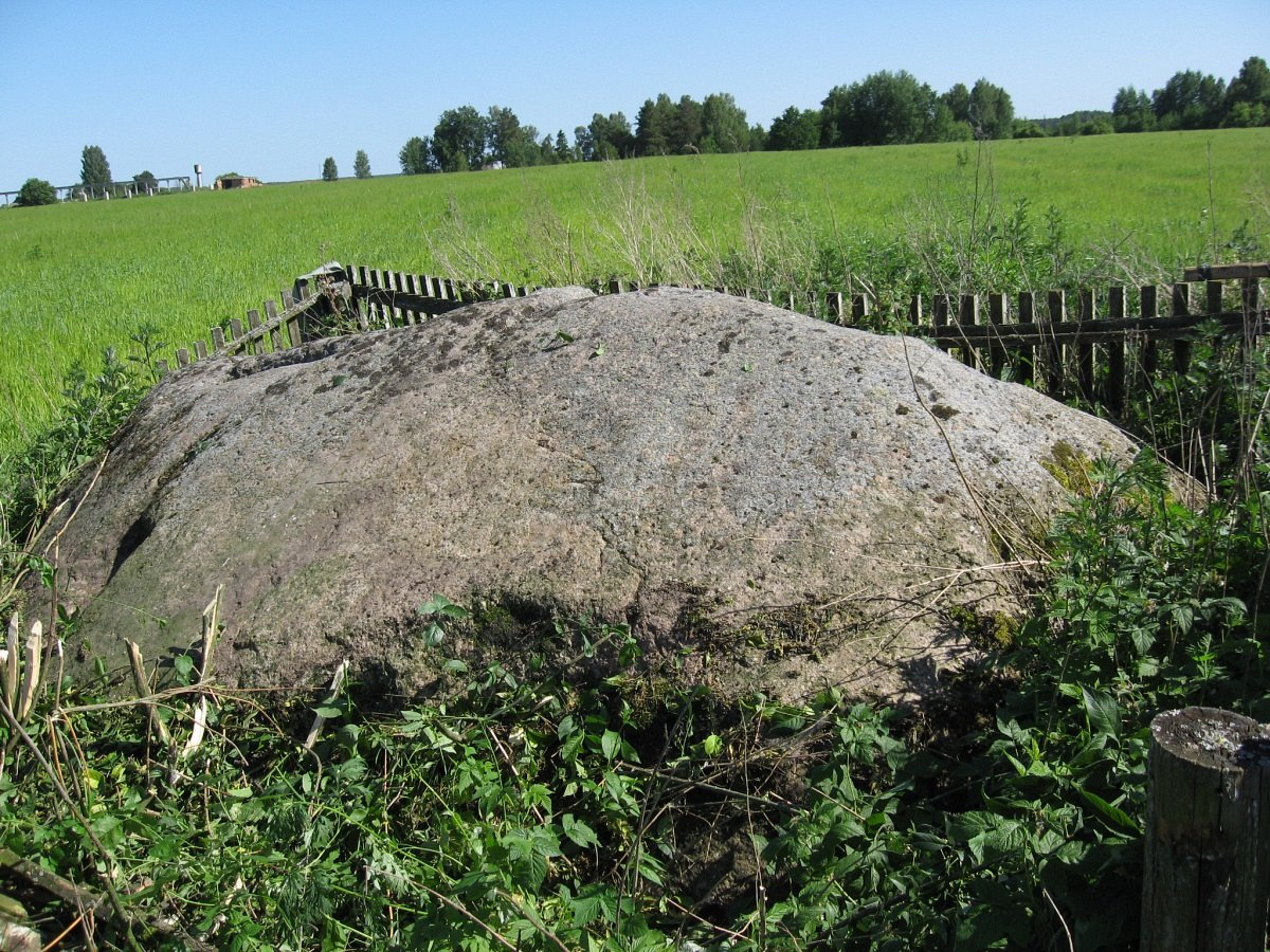 Мажэйкі. Вялікі камень мажэйкаўскі